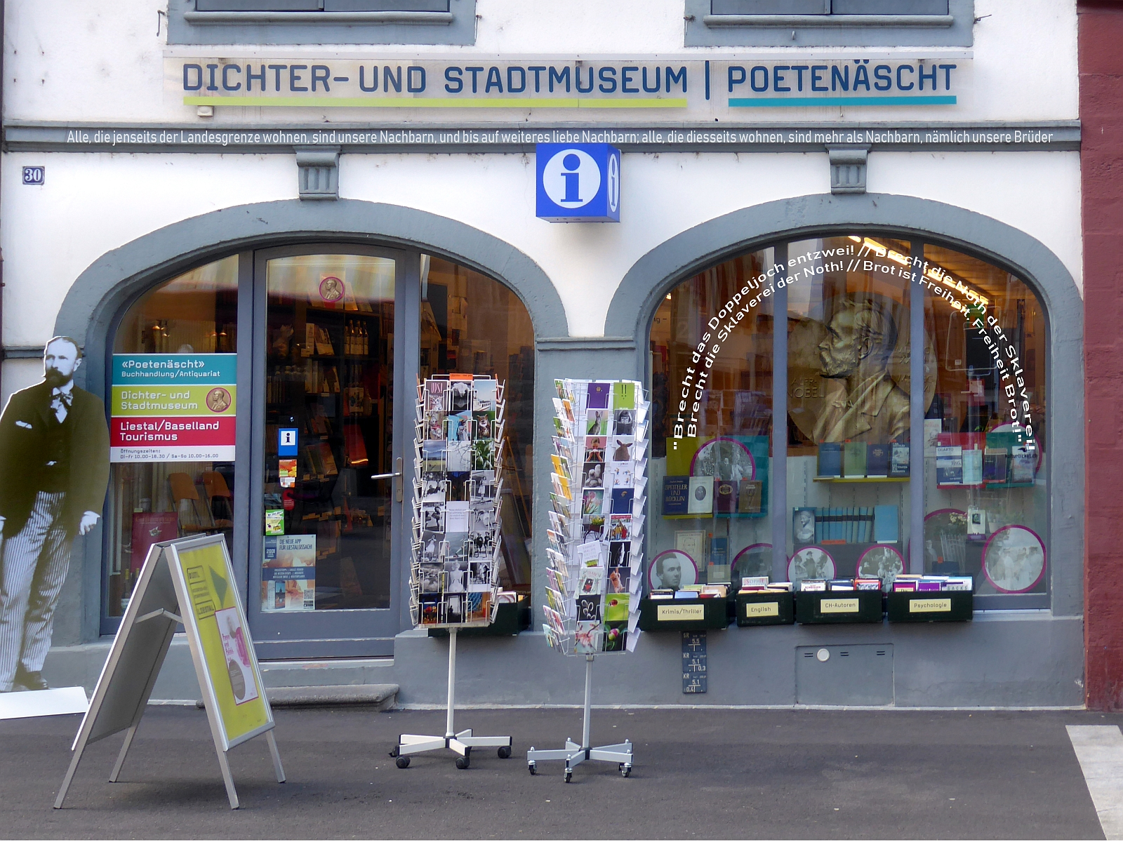 Dichter- und Stadtmuseum in Liestal, Georg Herwegh (1817-1875), Carl Spitteler (1845-1924)